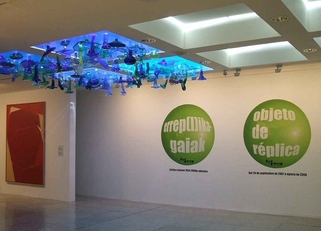 Water Flames (flowing), de Anabel Quincoces, en la antesala del Centro-Museo ARTIUM de Vitoria-Gasteiz